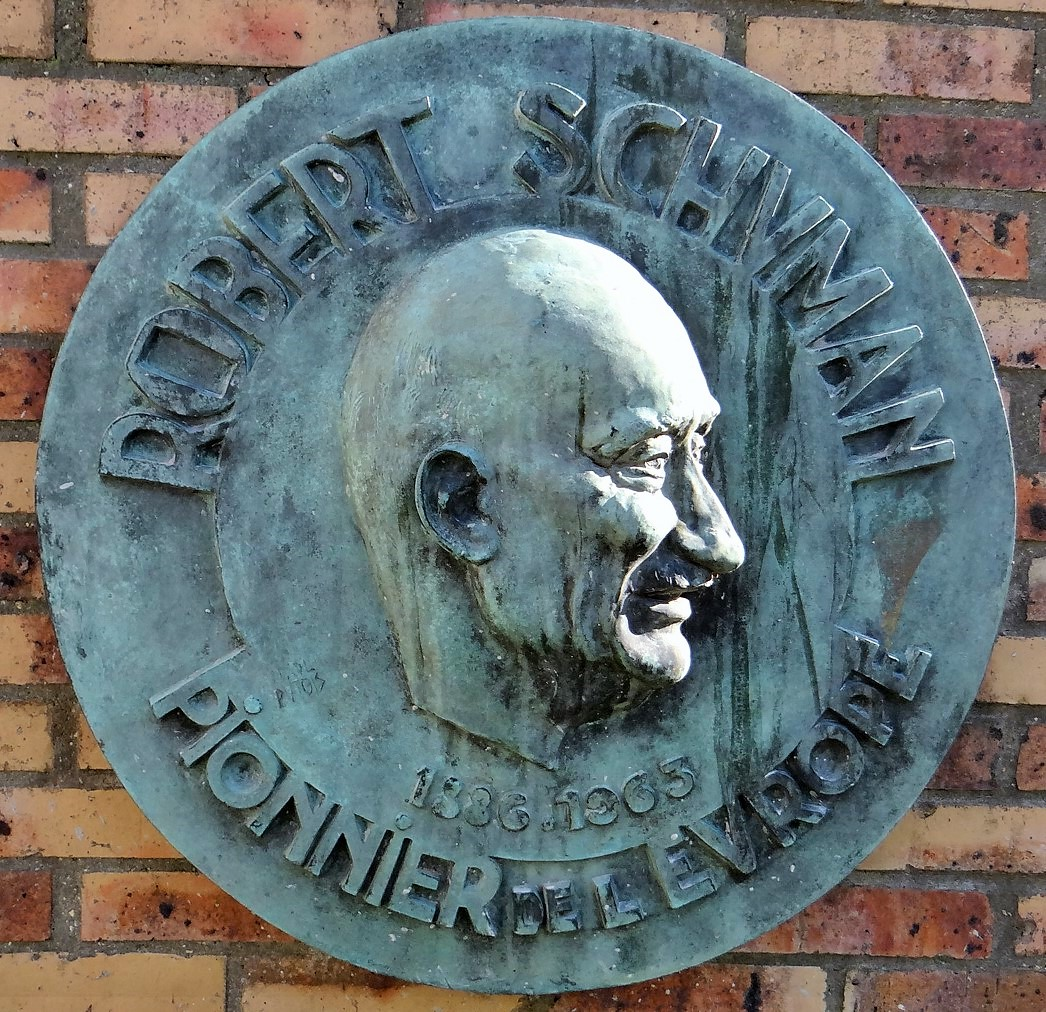 Square Robert Schumann à Montrouge